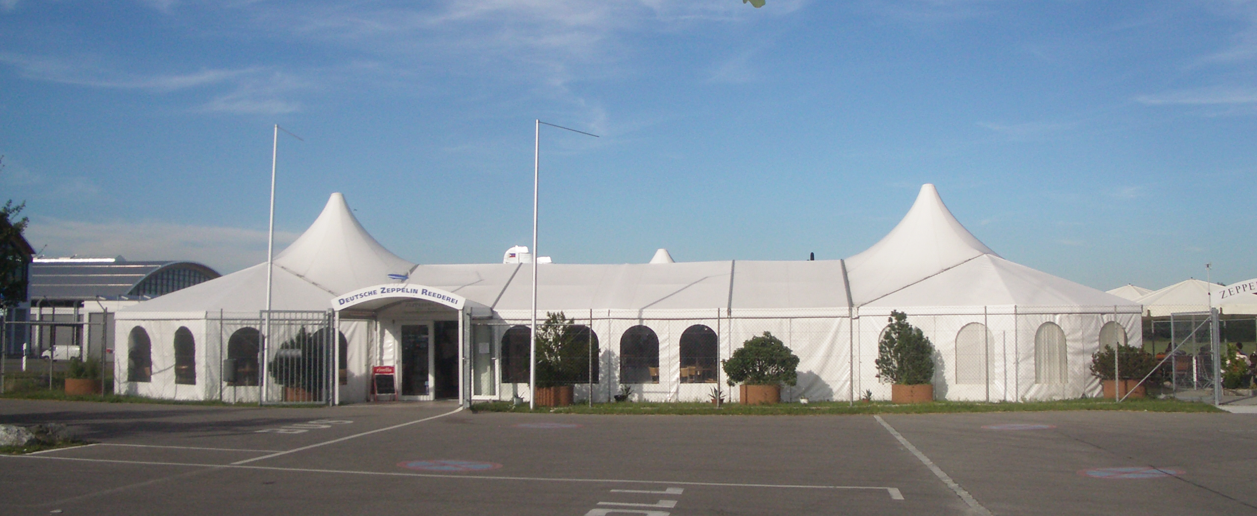 Zeppelin-Reederei Friedrichshafen (Abflugsgebäude mit Café)